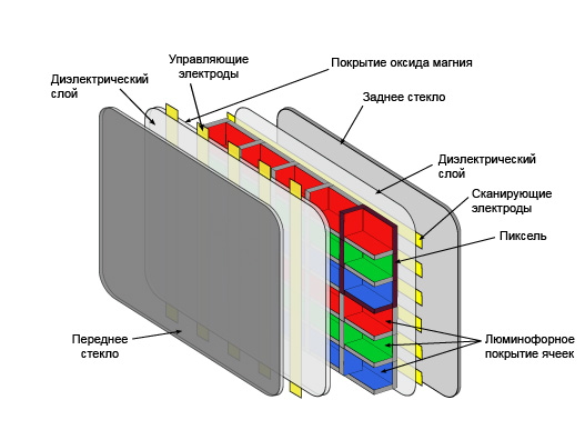 Состав плазменной индикаторной панели переменного тока c матричным электродом. (in Russian)